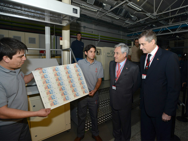 El Presidente de la República, Sebastián Piñera, acompañado del ministro de Economía, Fomento y Turismo, Félix de Vicente, encabezó esta tarde la ceremonia de conmemoración de los 270 años de historia de la Casa de Moneda de Chile, oportunidad en que se inauguró la nueva línea de producción de billetes con la última tecnología disponible a nivel internacional. Los nuevos equipos son capaces de imprimir más de 1.200 millones de billetes al año en cualquier sustrato –papel o polímero- de acuerdo a los estándares de tecnología, seguridad y calidad de cualquier banco central del mundo, incluso el de Chile.